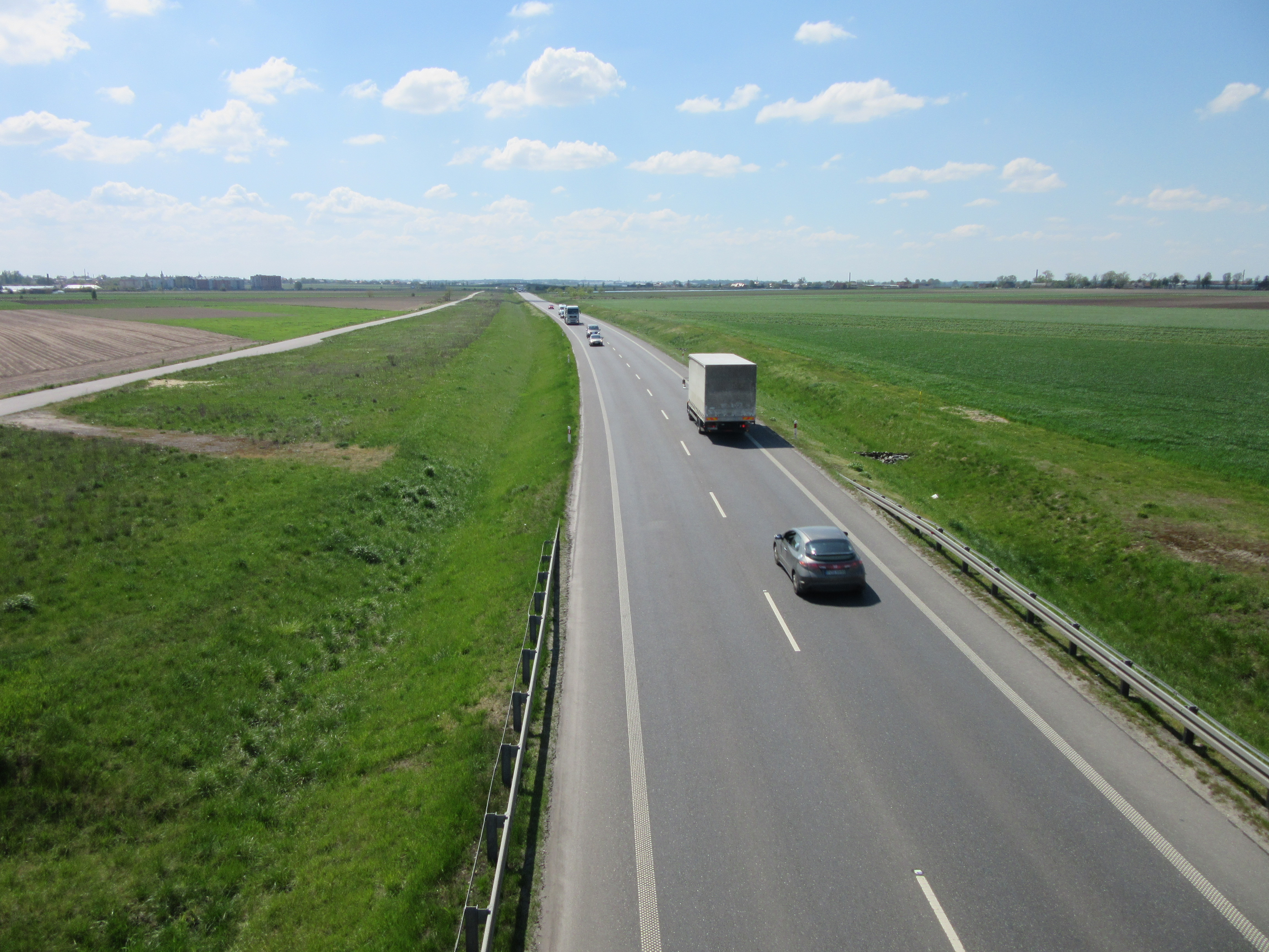 Obwodnica Nowych Skalmierzyc w ciągu drogi krajowej nr 25